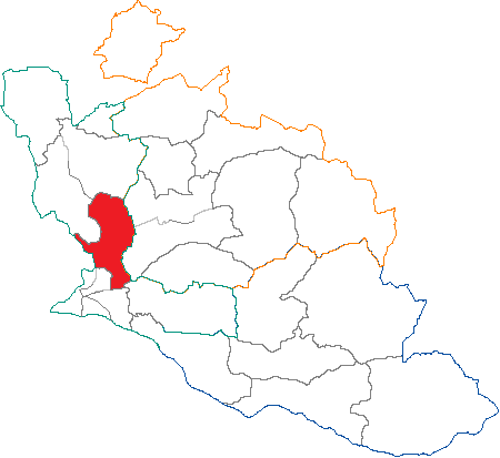 Situation du canton dans le département de Vaucluse (France)